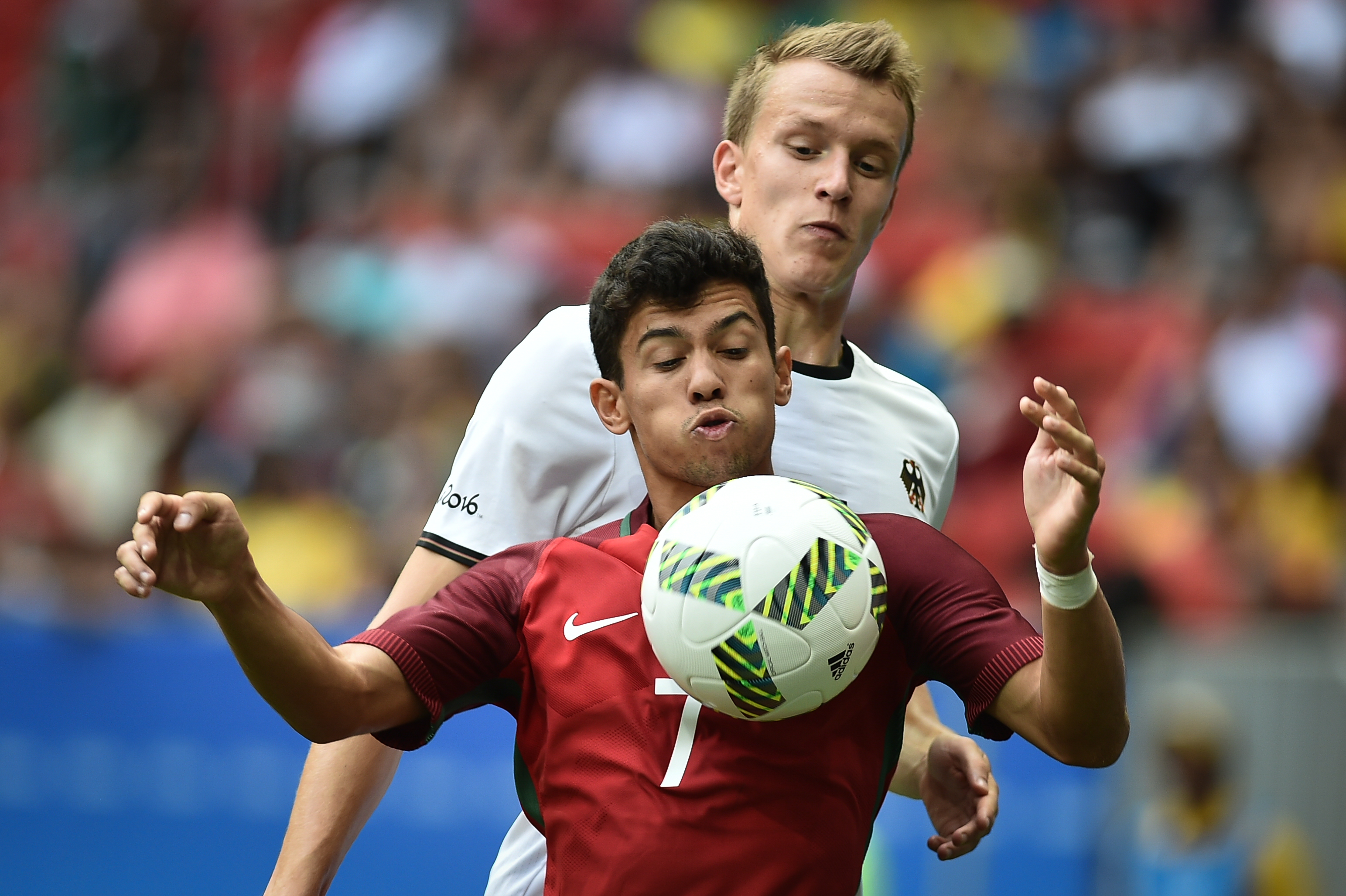 Estádio Nacional de Brasília Mané Garrincha, Brasília, DF, Brasil, 13/8/2016 Foto: Andre Borges/Agência Brasília Portigal e Alemanha jogam neste sábado (12), no Estádio Mané Garrincha, pelas quartas de final do futebol masculino nas Olimpíadas 2016.